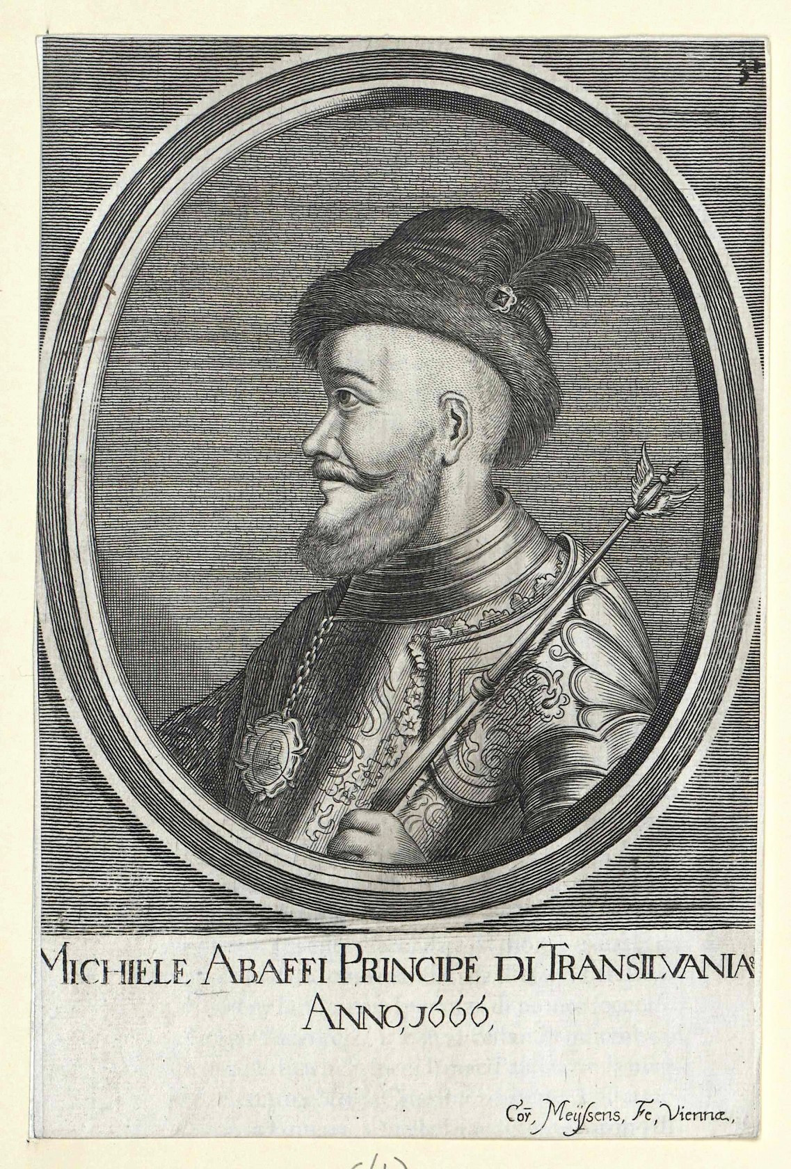 Apafi Mihály erdélyi fejedelem